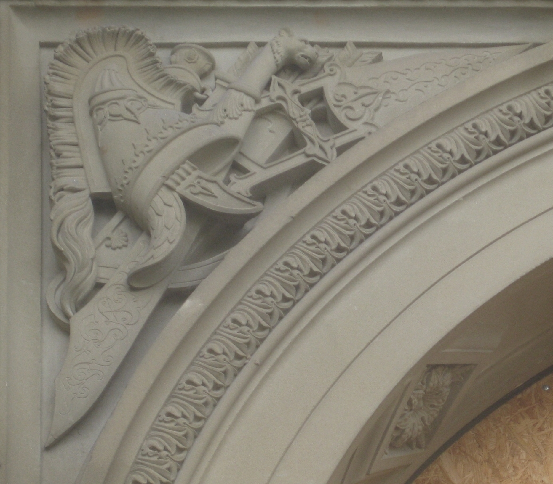 Bogenzwickelrelief mit Trophäe, Stuttgart, Villa Berg, Ostfassade, Erdgeschoss, linke Seitenädikula, linkes Relief.